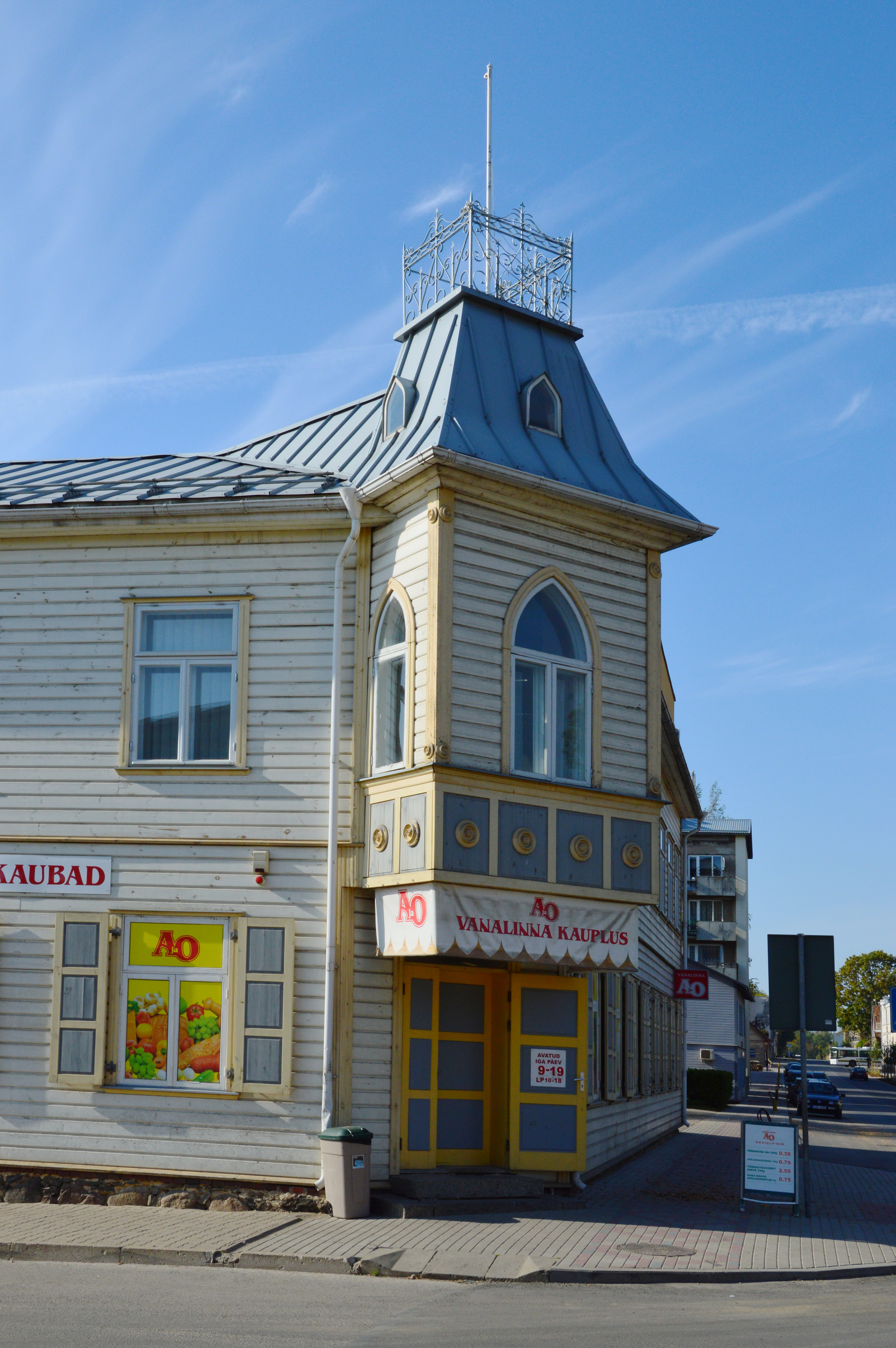 A ja O toidupood Võrus